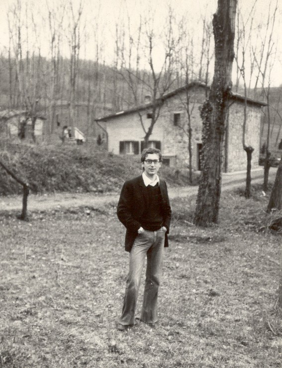 L'onorevole italiano Franco Grillini a 25 anni.